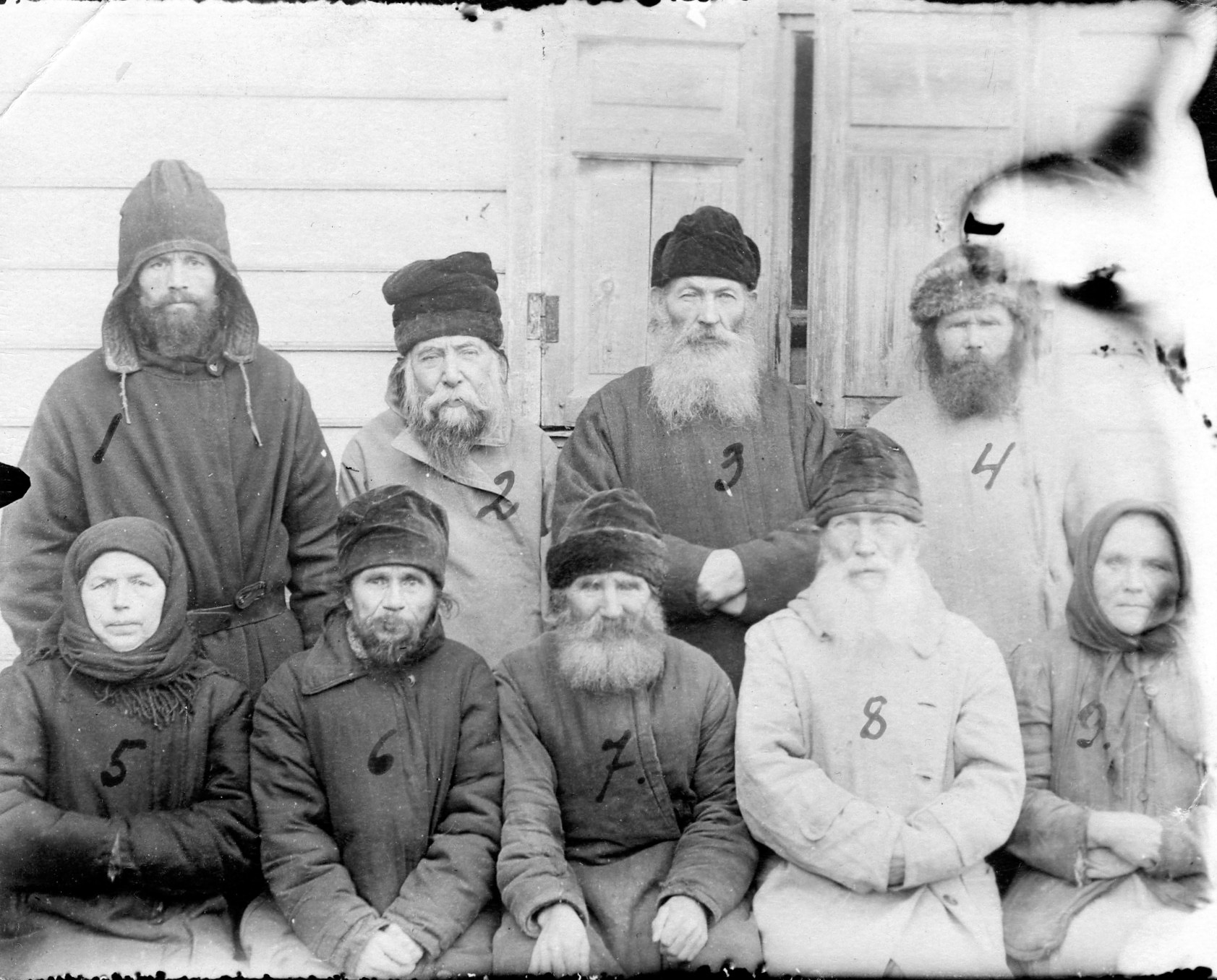 Братия Кирилло-Челмогорского монастыря, прошедшая через лагеря Гулага, пытки и расстрелы в первой половине ХХ века. Цифрой 2 обозначен епископ Варсонофий (Вихвелин) см.